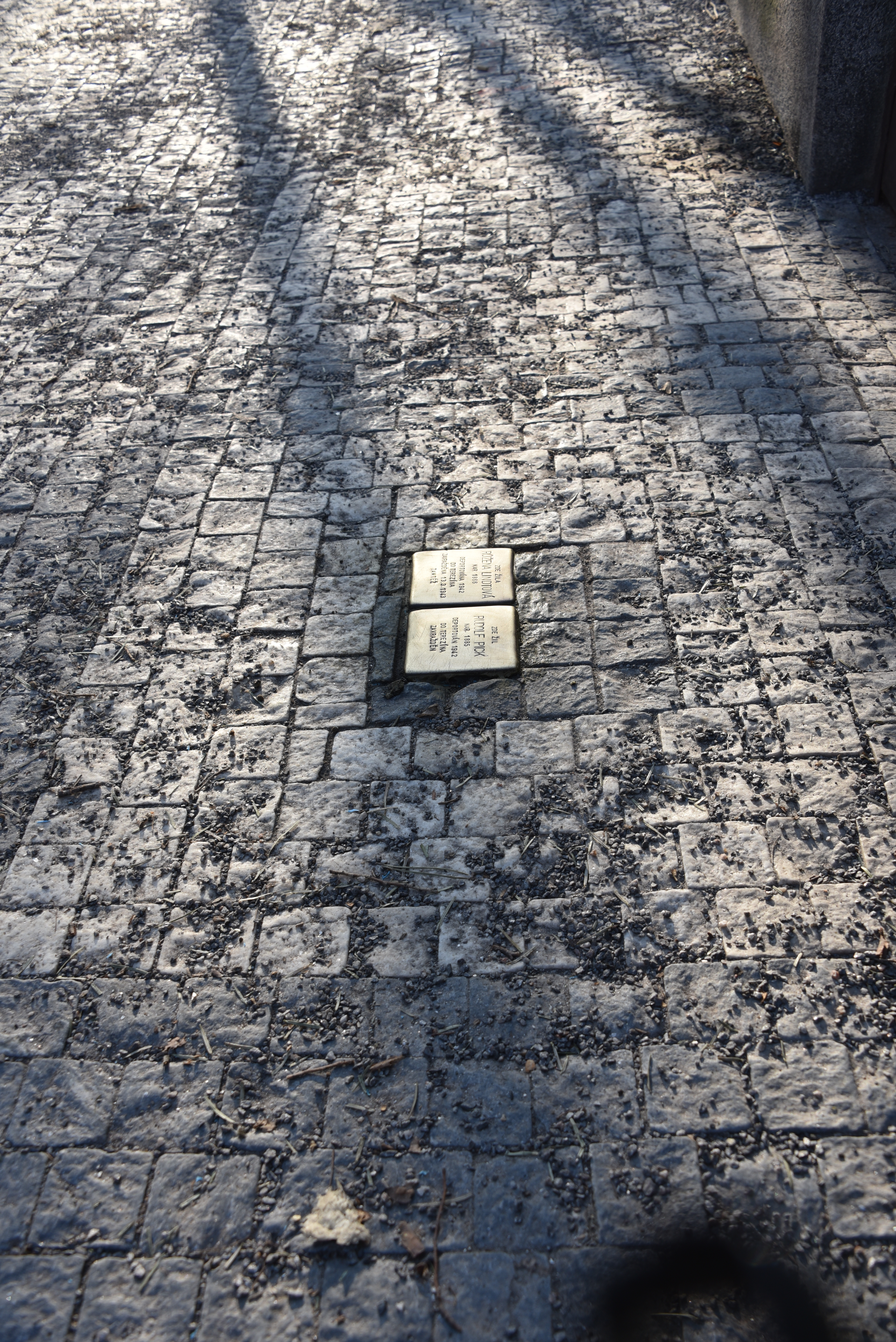 Stolpersteine für Ruzena Lindtova und Rudolf Pick